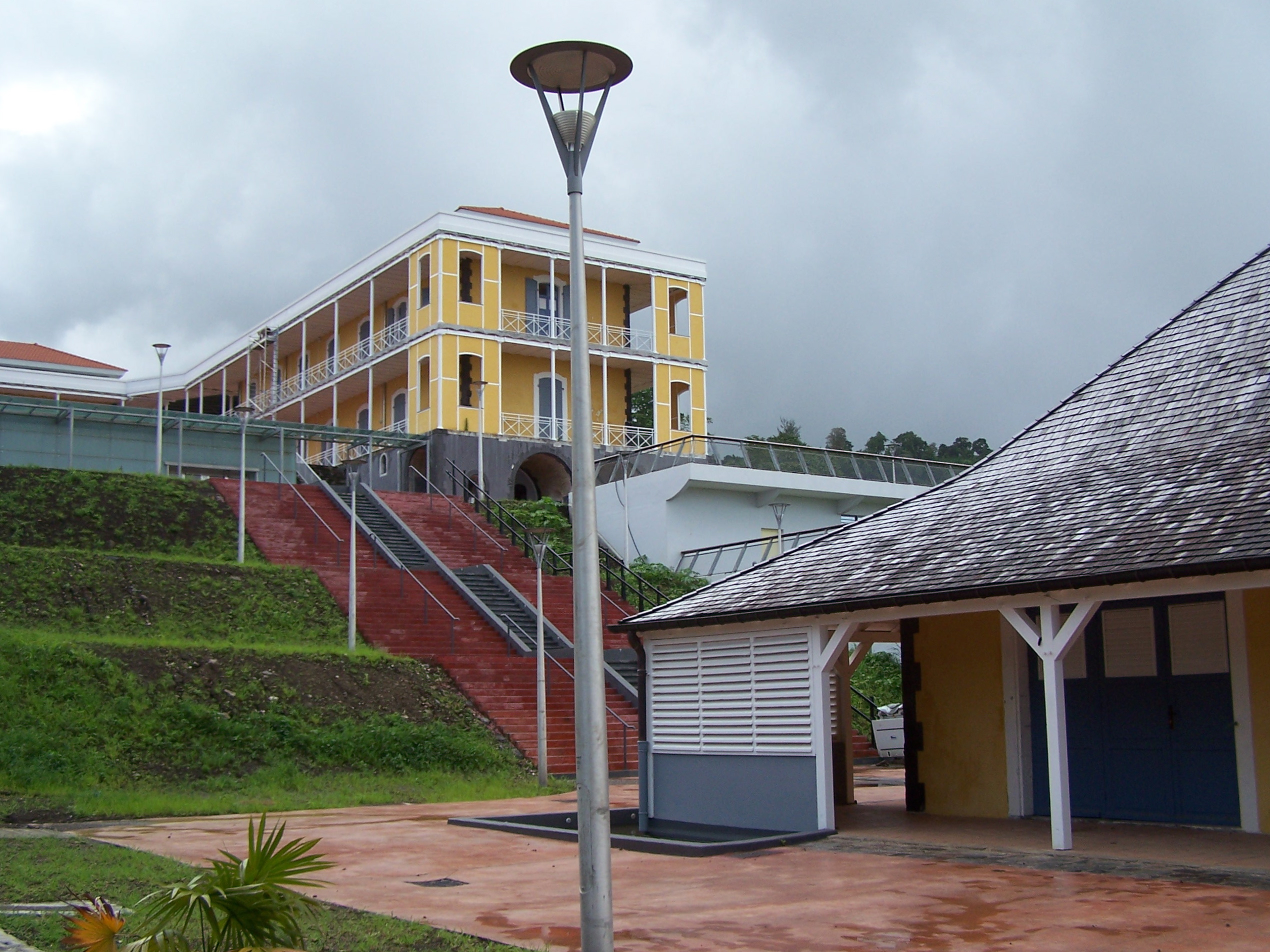 Camp Jacob de l'Université des Antilles et de la Guyane (ancien hôpital militaire du camp Jacob) à Saint-Claude, Guadeloupe.